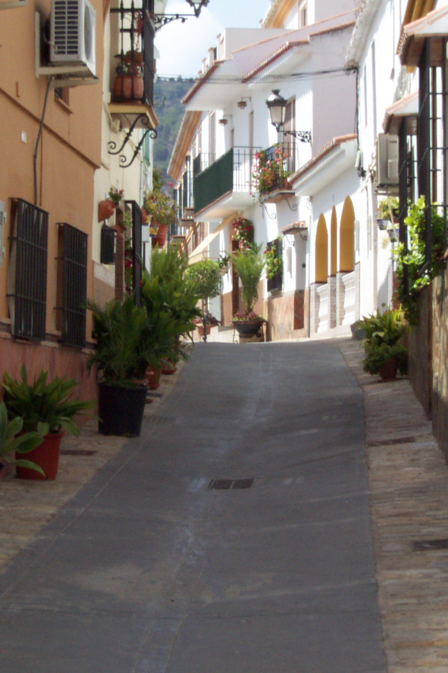 Alhaurín de la Torre, Spain.